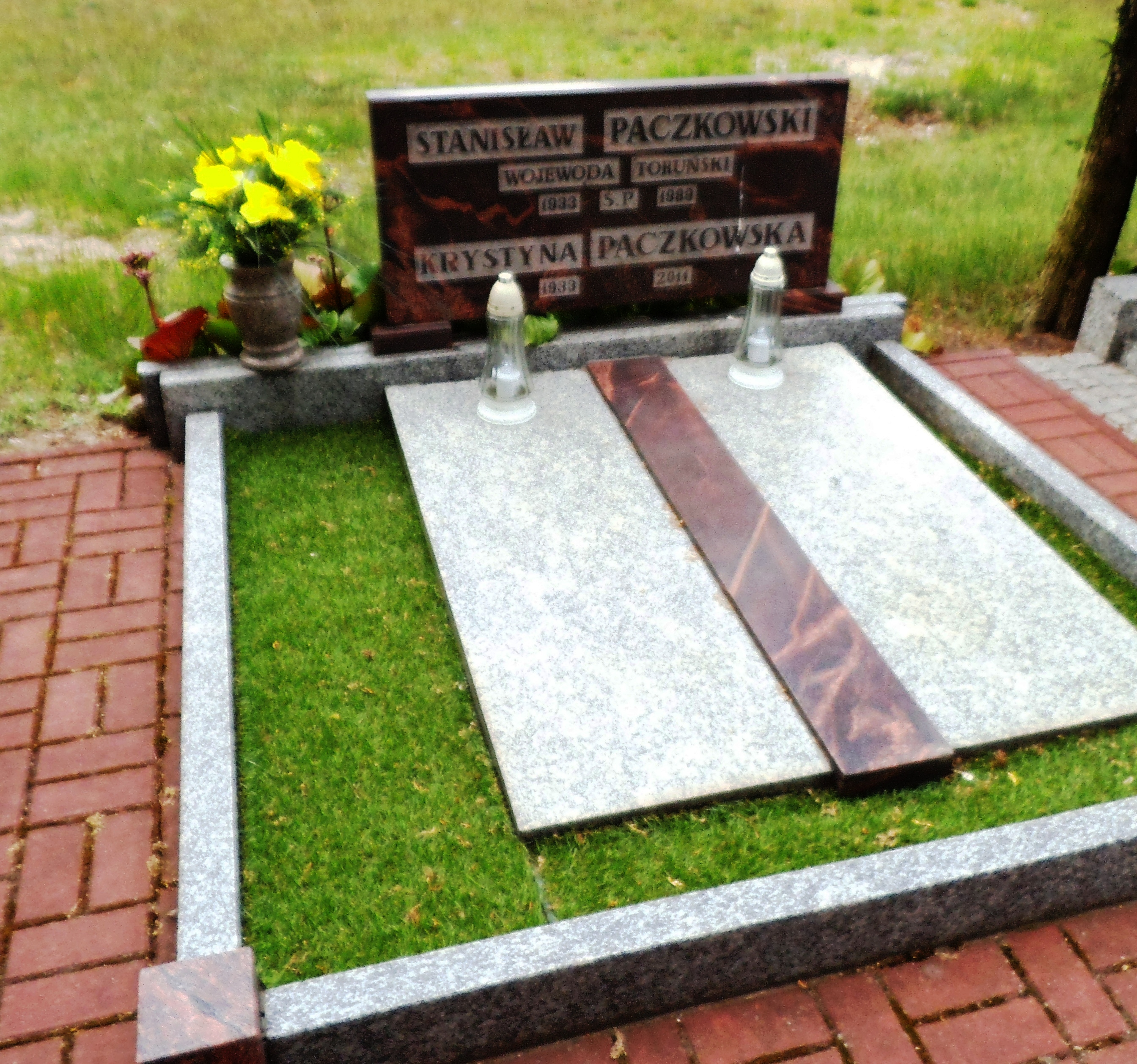 Stanisław Paczkowski, grób